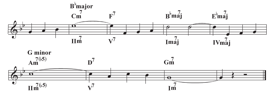 Autumn Leaves-ის მუსიკალური თემა